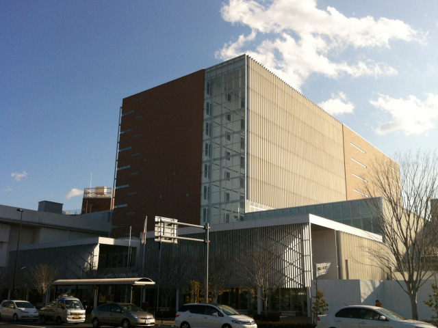 町田市役所 本庁舎（東京都町田市森野2-2-22）